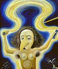 Omslaget till Klossa Knapitatet. Målning av Tage Åsén